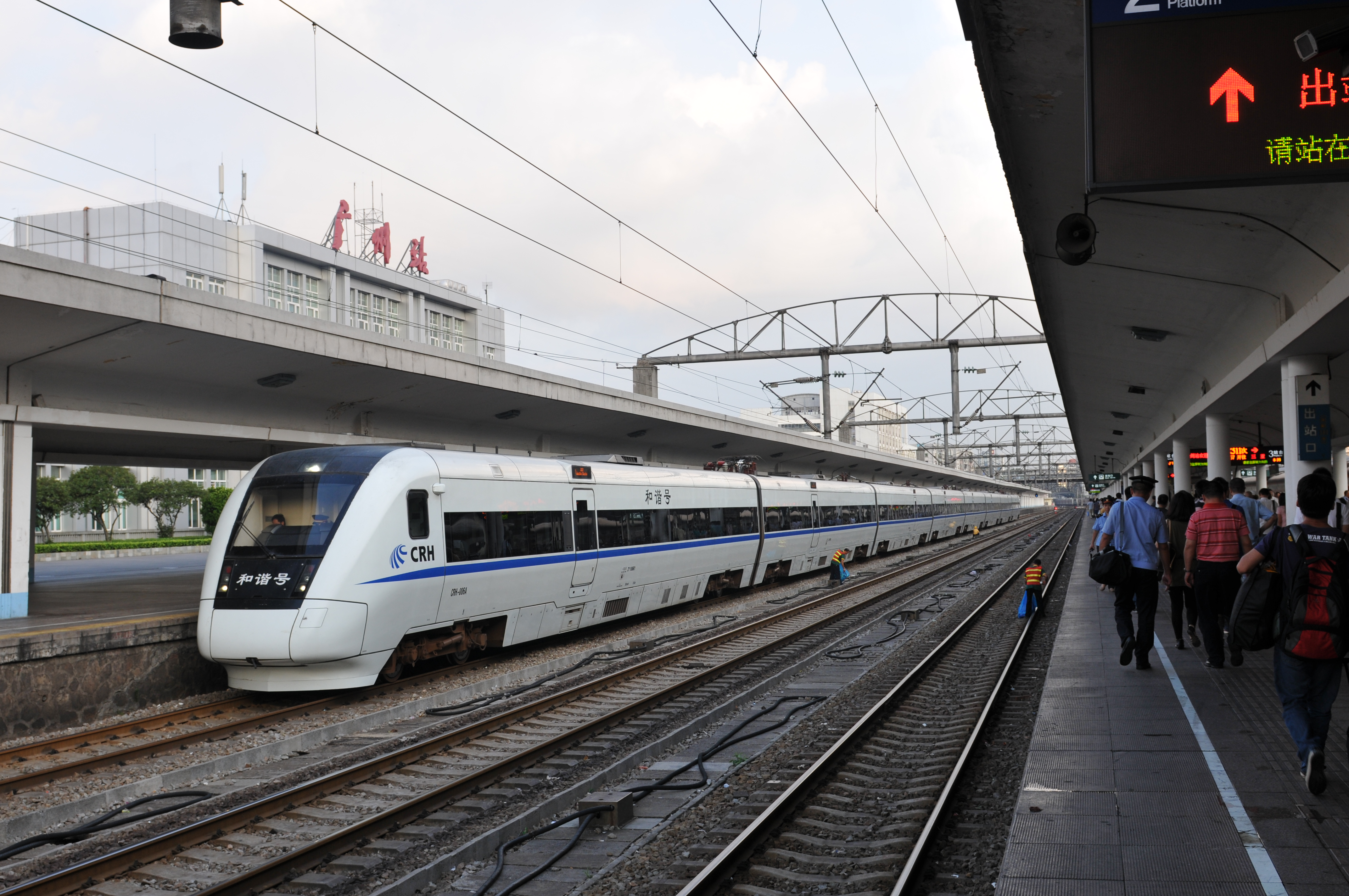 中国广东省广州市越秀区 China Yuexiu District, Guangzhou City, Guangdong ProvinceChina Xinjiang Urumqi Welcome you to tour the, Китай Синьцзяна Урумчи приветствовать Вас на экскурсию, الصين ترحب زيارتك لاورومتشى فى شينجيانغ, 中国新疆のウルムチへの訪問を歓迎する, 中国新疆乌鲁木齐欢迎您来观光旅游